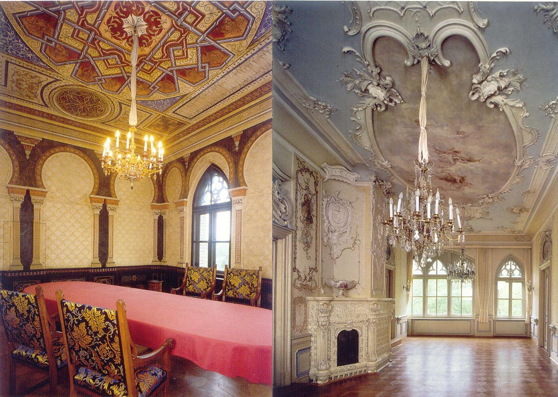 Dieses Bild zeigt den Maurischen Saal des Schloss Spindlhof auf der linken und den Musiksaal im Stil des Rokoko auf der rechten Seite des Bildes. Beide Säle befinden sich in der Belétage des Schlosses Spindlhof